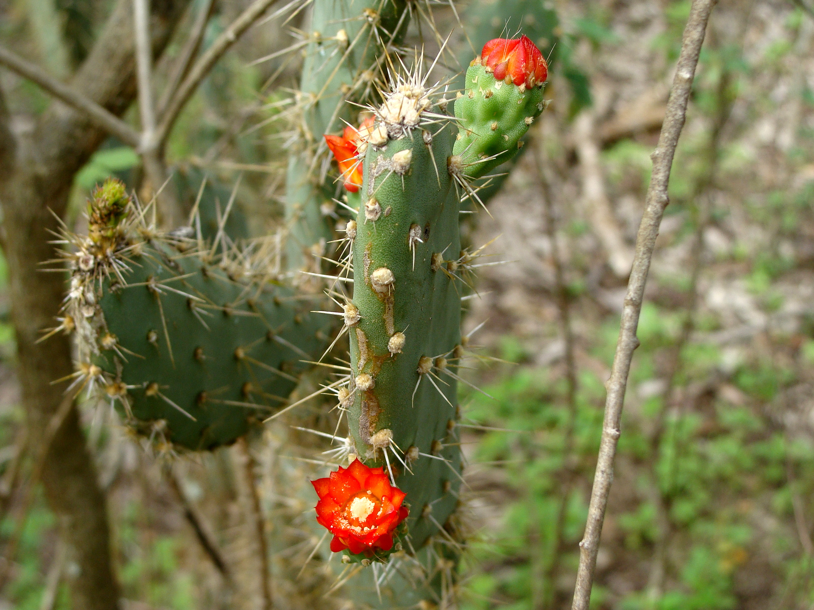 Registro fotográfico de uma cactácea na época da floração na Caatinga Paraibana, município de Boa Vista.